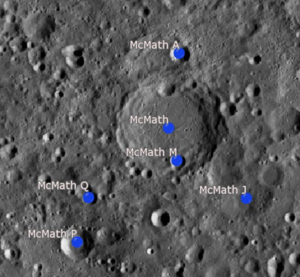 Cráter lunar McMath. Cráteres satélite. (Imagen LRO)